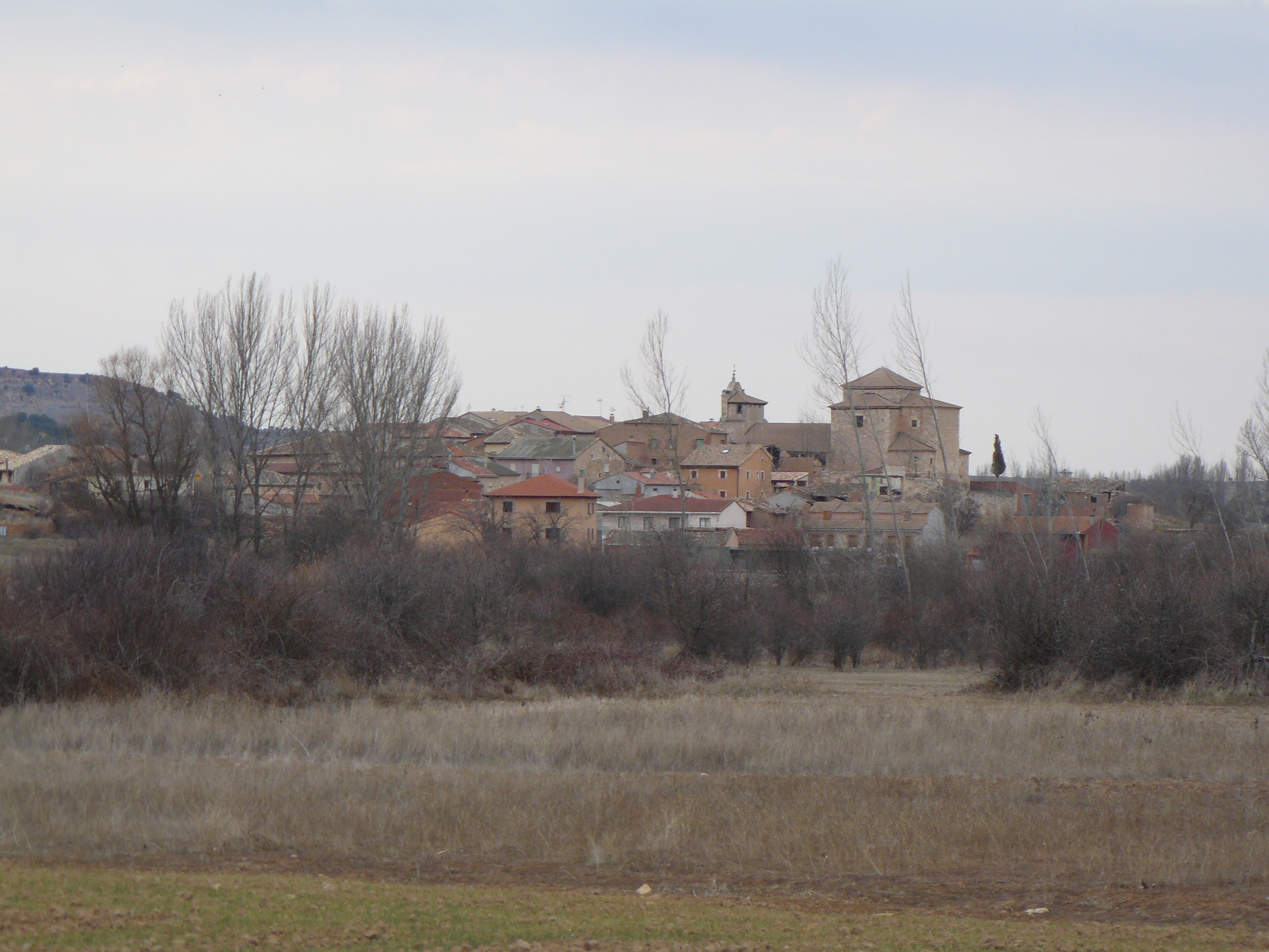 Piquera de San Esteban, Soria.